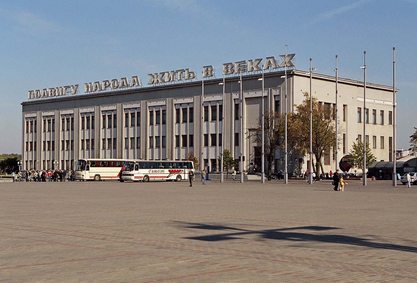 October square, Minsk, taken 2007.09.22